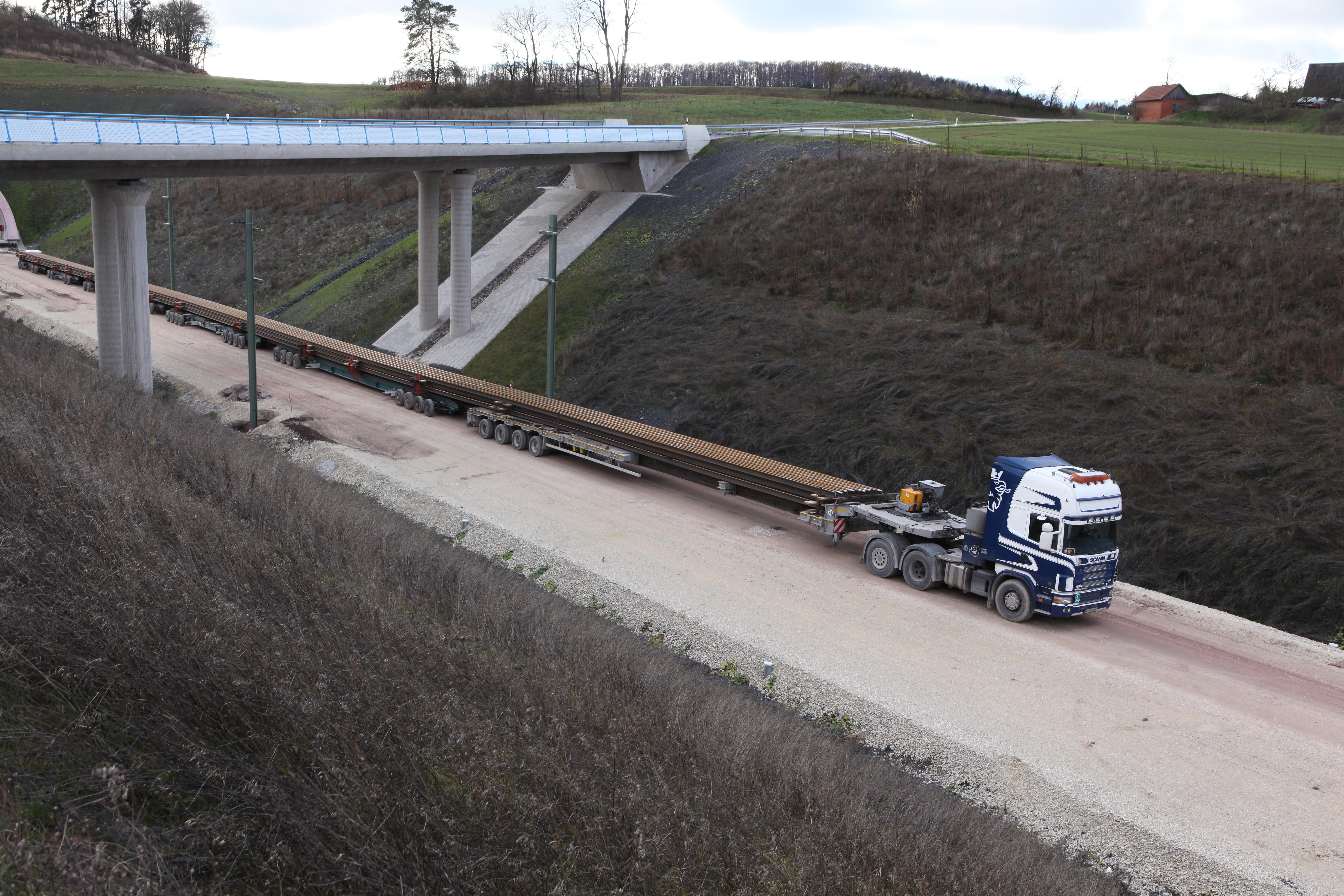 Schienentransportfahrzeug am Nordportal des Tunnel Reiterberg; 120 m lange Schienen, 260 to Schienen, 154 Reifen